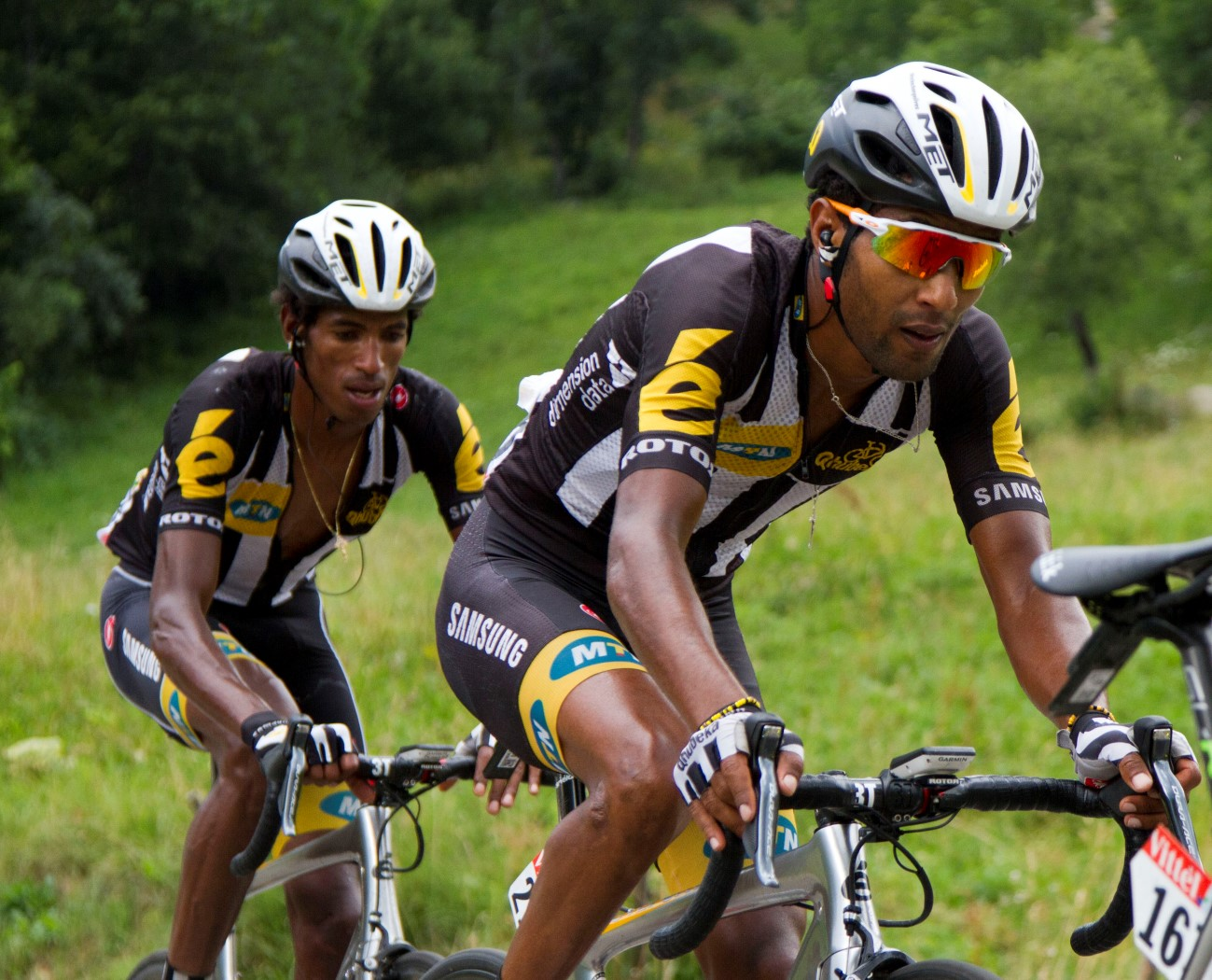 194 teklehaimanot en kudus